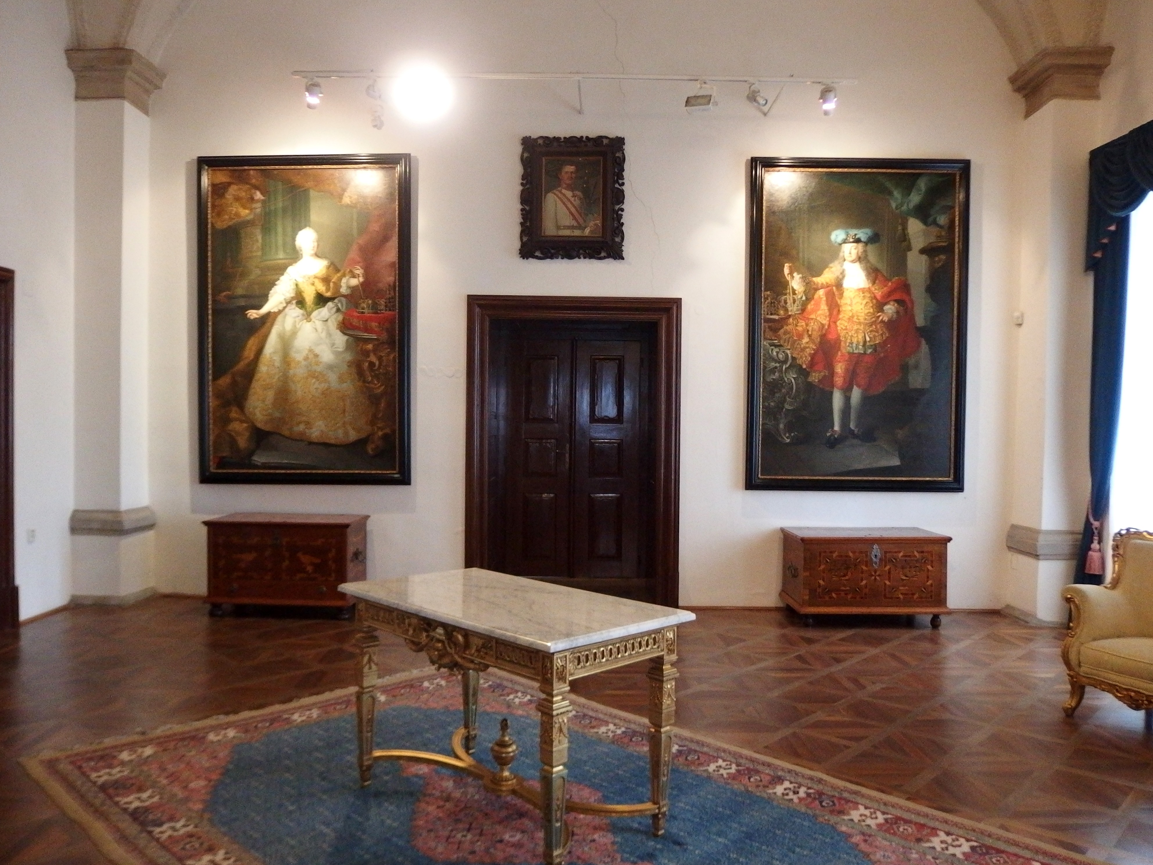 Zámek Brandýs nad Labem, Plantáž 402/8, nad řekou, Brandýs nad Labem.